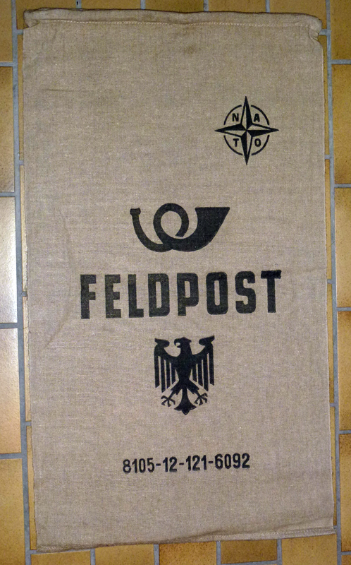 Postbeutel der deutschen Feldpost (Bundeswehr)